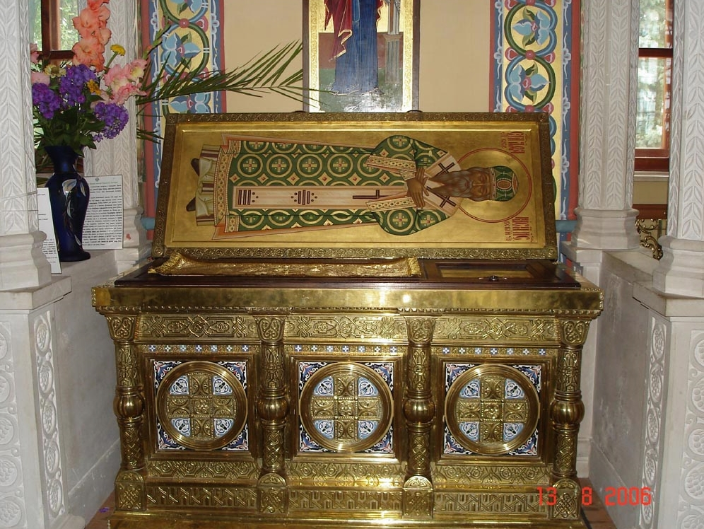 Рака с мощами святителя Афанасия. Автор Звёздкин В.А.